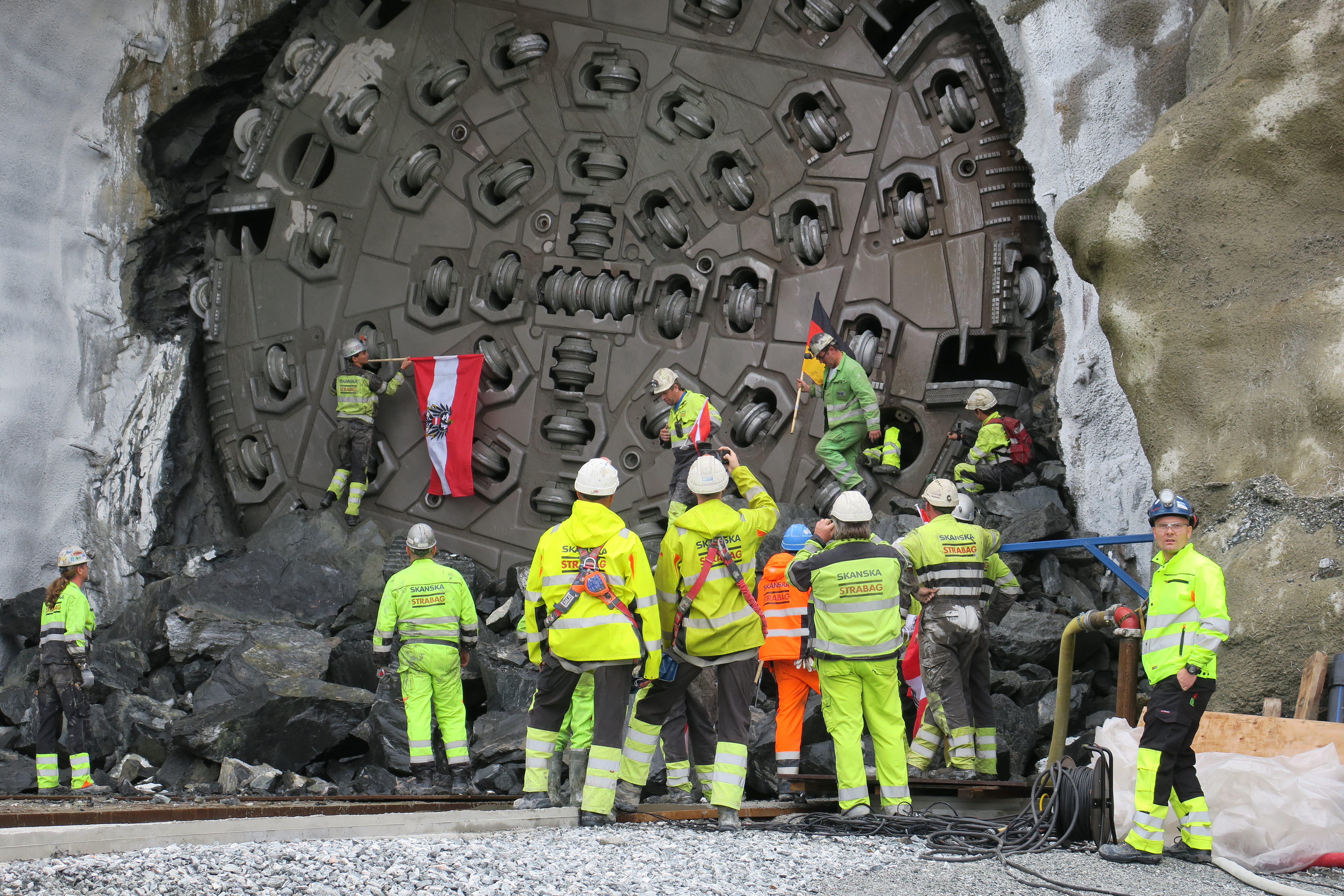 Gjennombrudd i Ulrikstunellen 29. august 2017